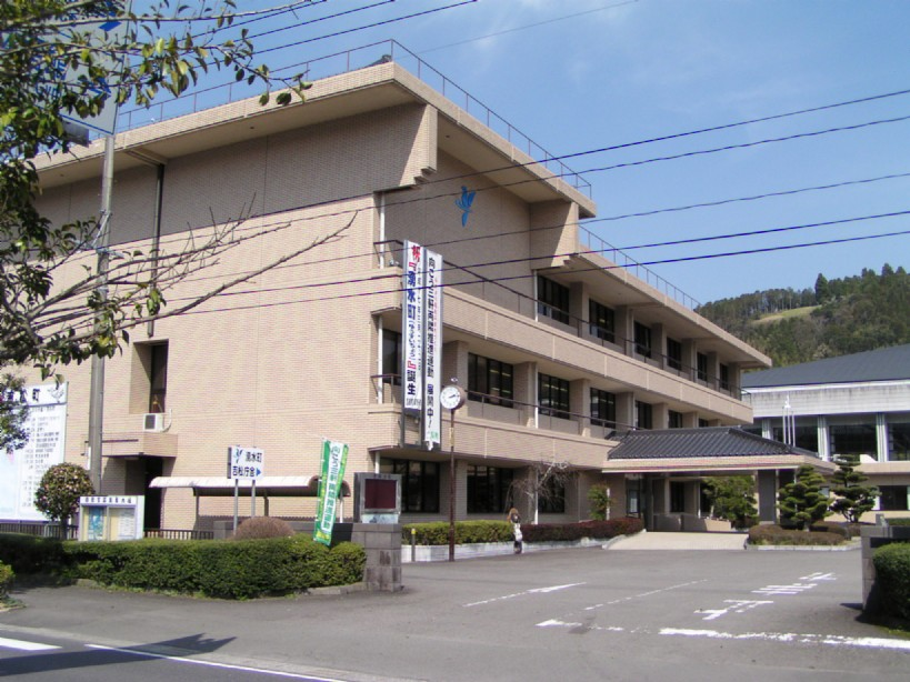 湧水町吉松庁舎 湧水町の吉松庁舎です。 2005年3月29日に投稿者が撮影したものです。